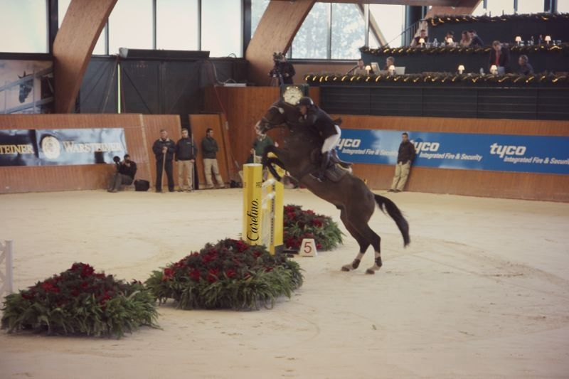 Concurso Internacional de Invierno en el Centro Hípico Casas Novas, 14-16 diciembre 2012. El jinete es Antonio Honrubia González, quien regularmente se entrena en el Centro Ecuestre "Las Mariñas".